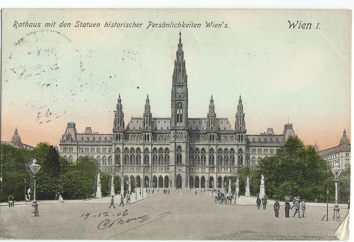 Vue de Vienne au début du XXe siècle.